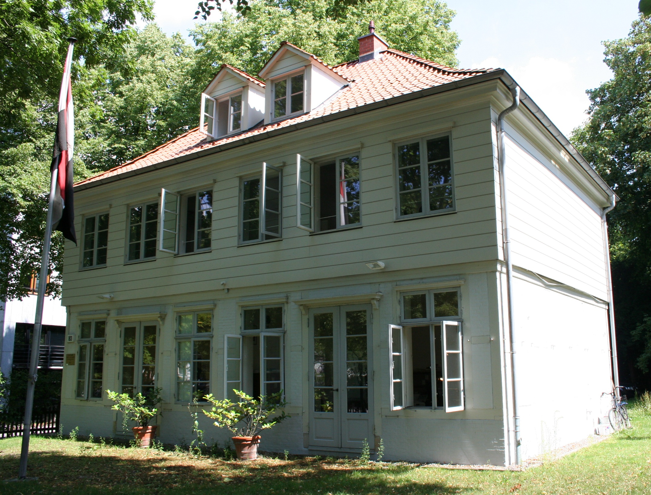 Ein klassizistischer Fachwerkbau von 1820 in Mittelweg 183, Hamburg, eines der letzten Zeugnisse der Bebauung vor dem Dammtor.